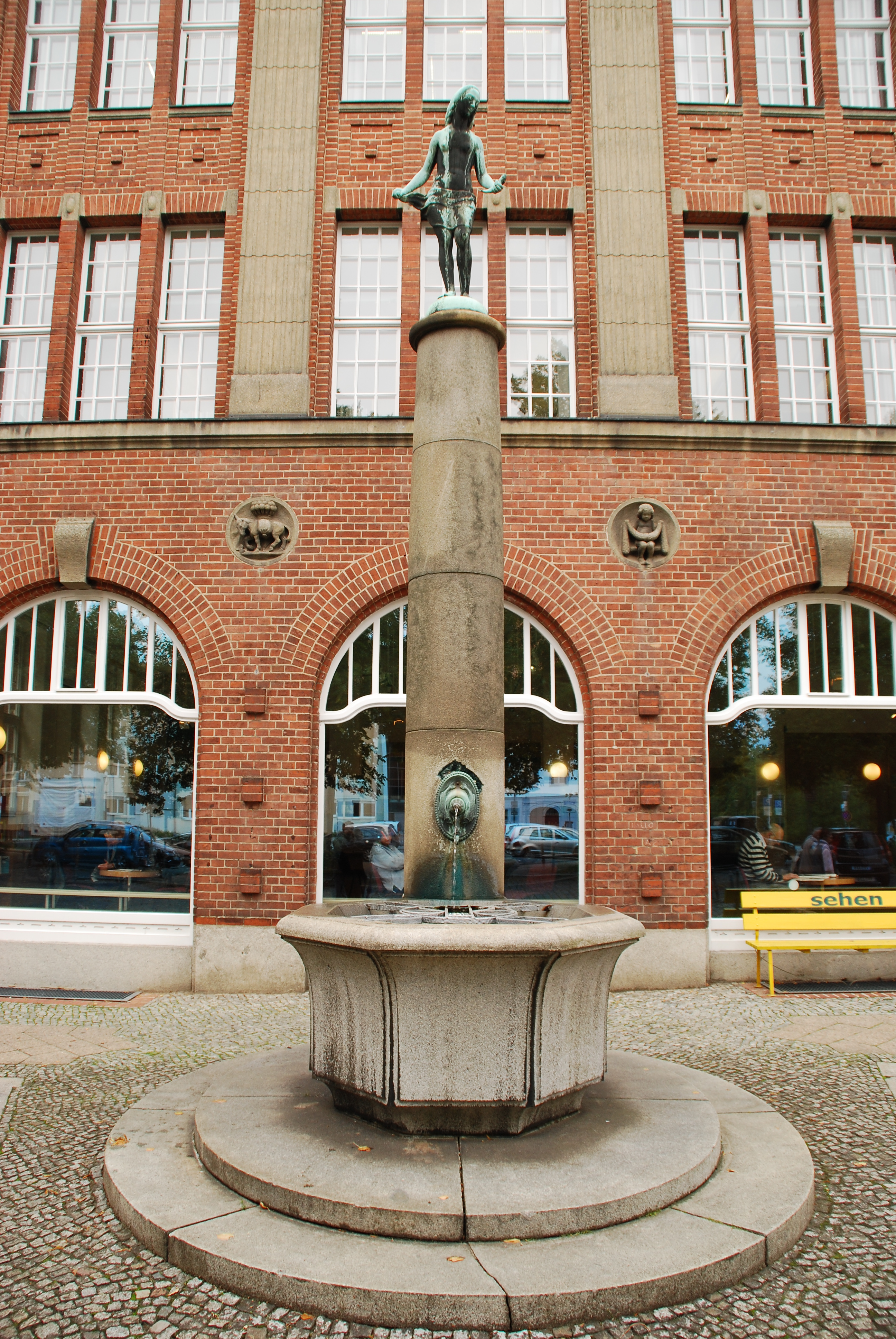 Steinbockbrunnen Frankfurt (Oder)